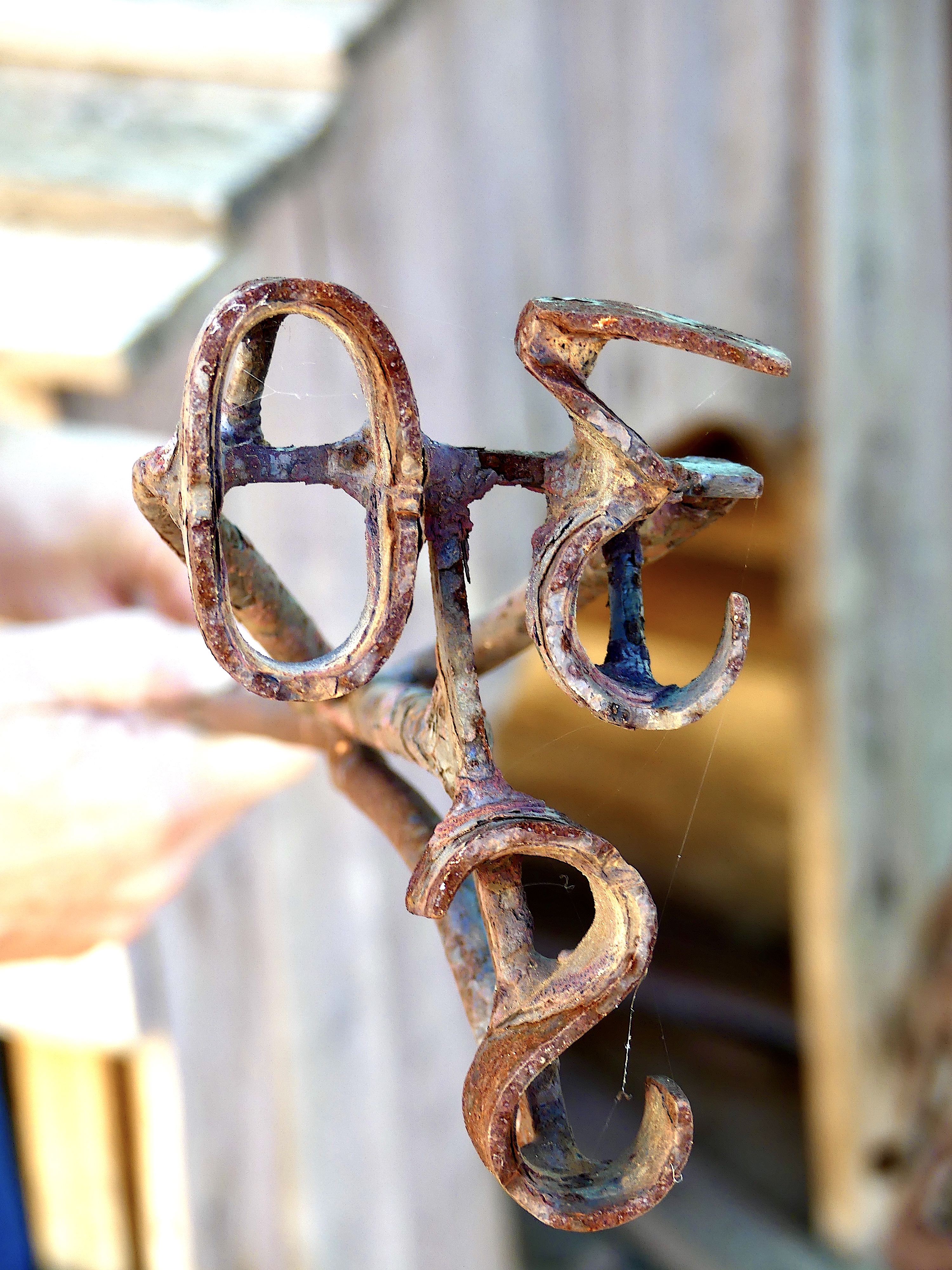 Brandeisen mit der Markierung "30S"